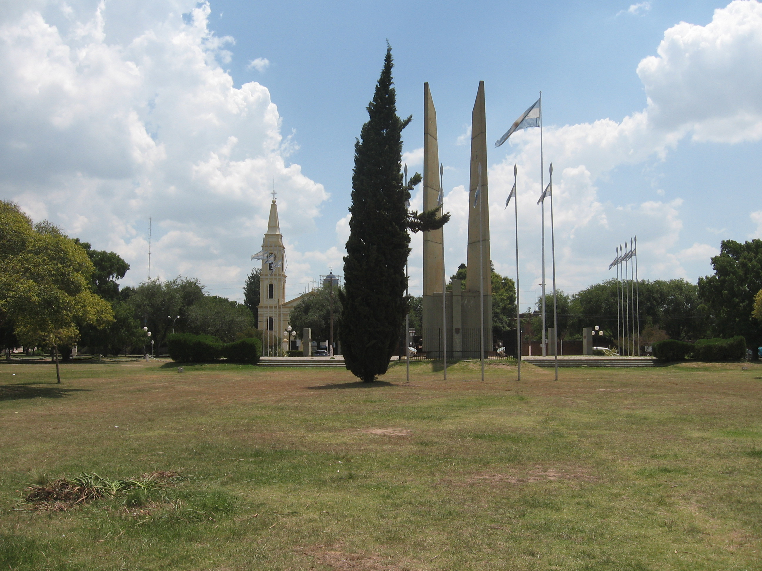 Campo de la Gloria, donde se celebró la Batalla de San Lorenzo. Al fondo se distinguen el Monumento a la batalla y el Convento San Carlos